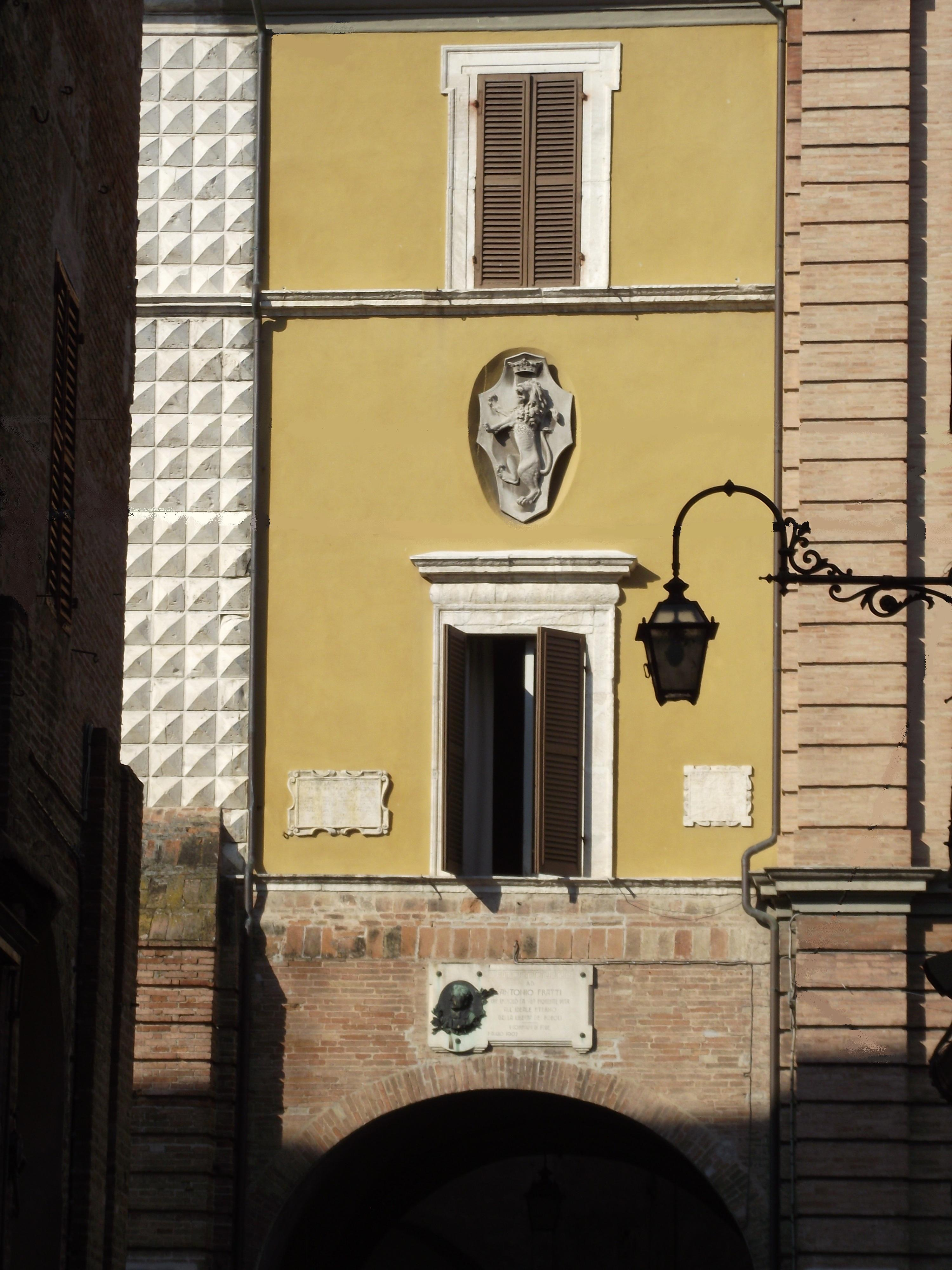 Palazzo comunale, XVI-XVIII secolo. Particolare con l'Arco del magistrato.